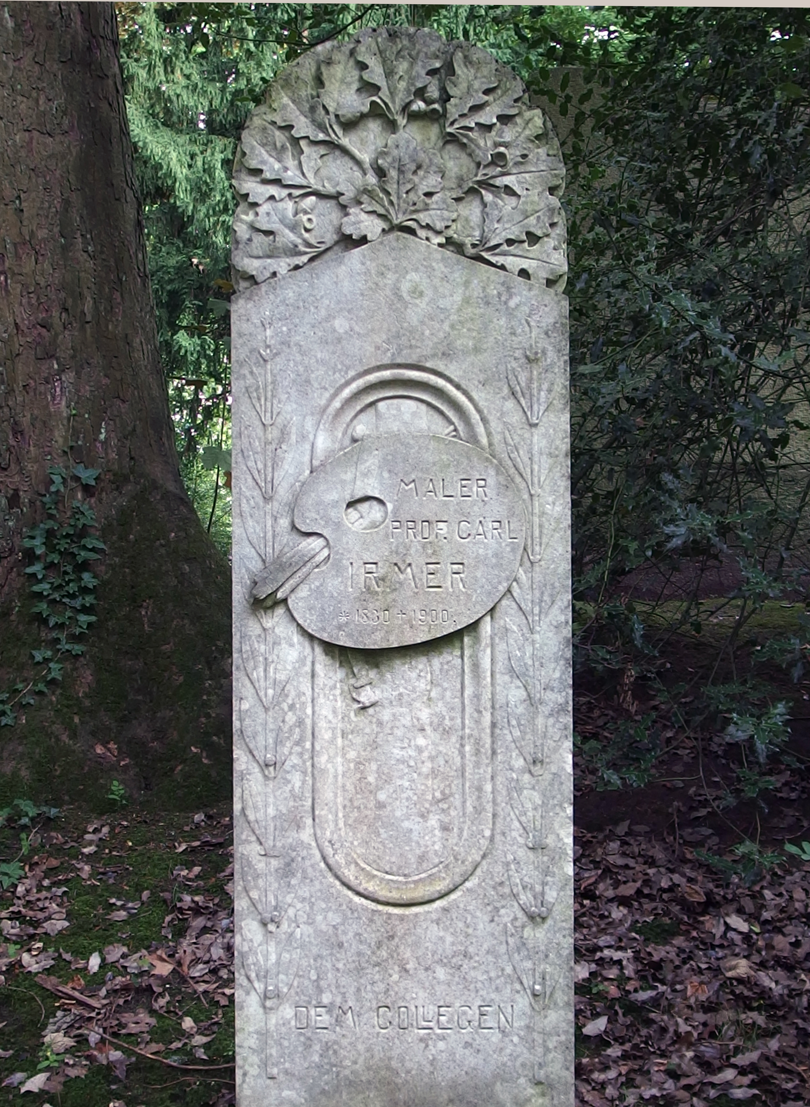 Grabstein dem Collegen Carl Irmer, Maler (1830-1900)